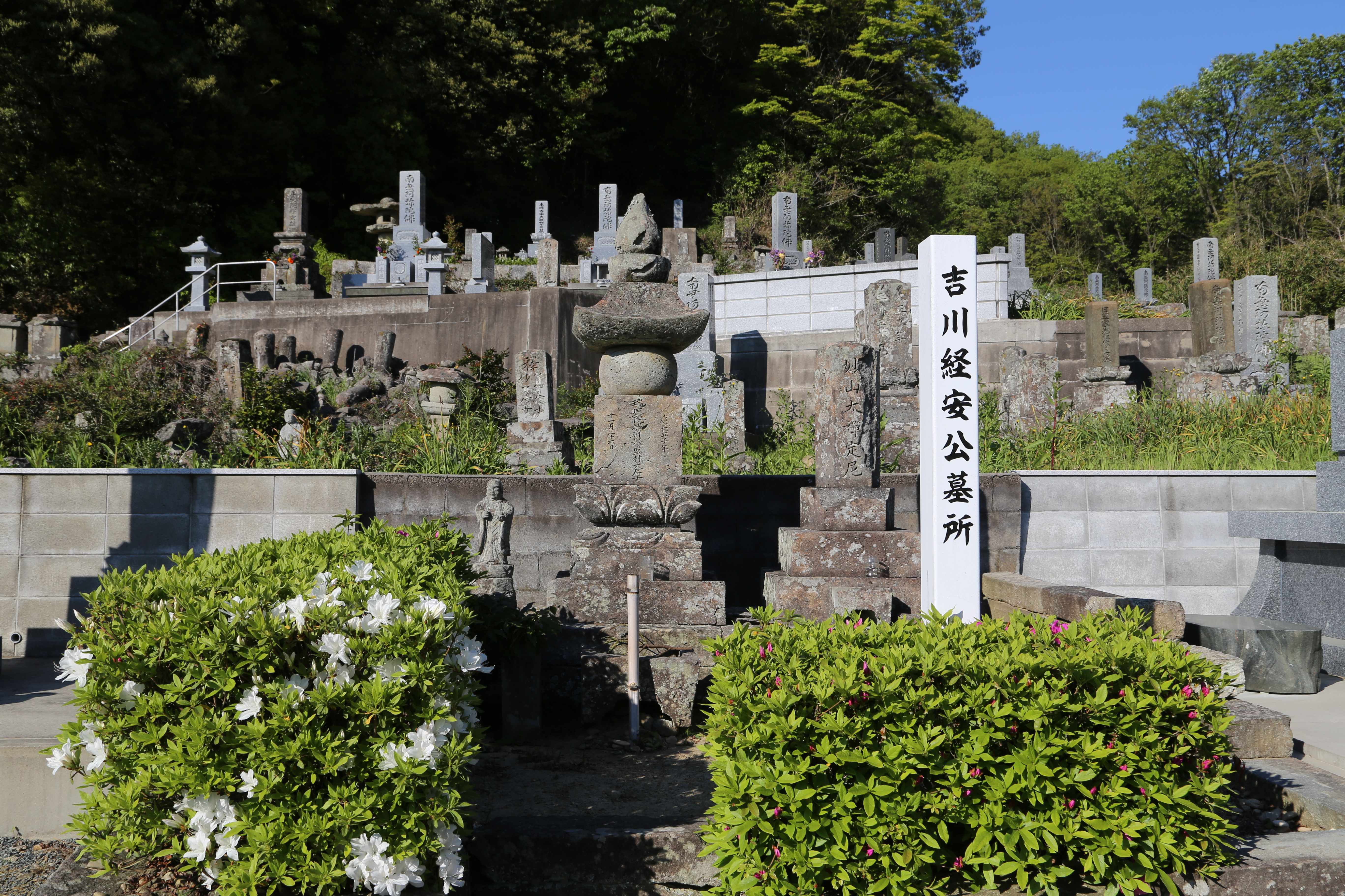 吉川経安墓（島根県大田市） Canon EOS 6D